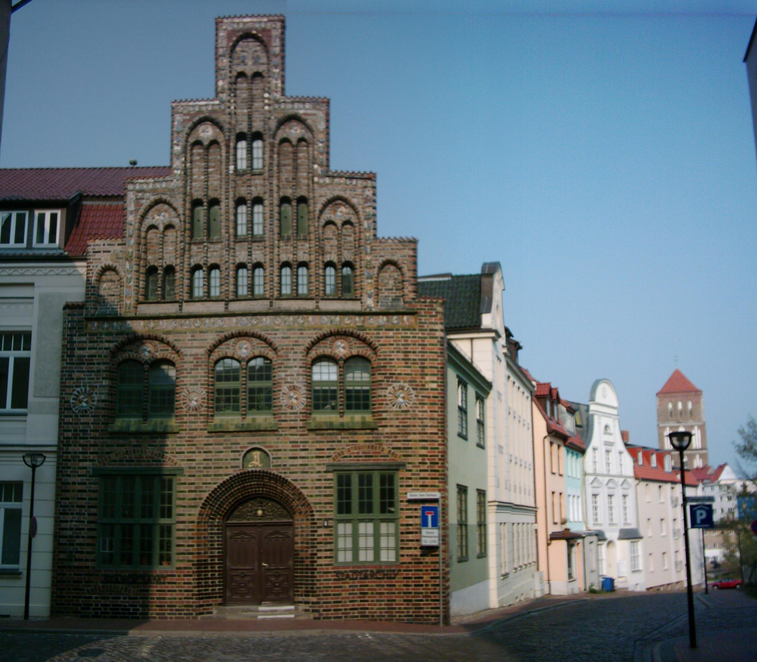 Rostocker Kerkhofhaus